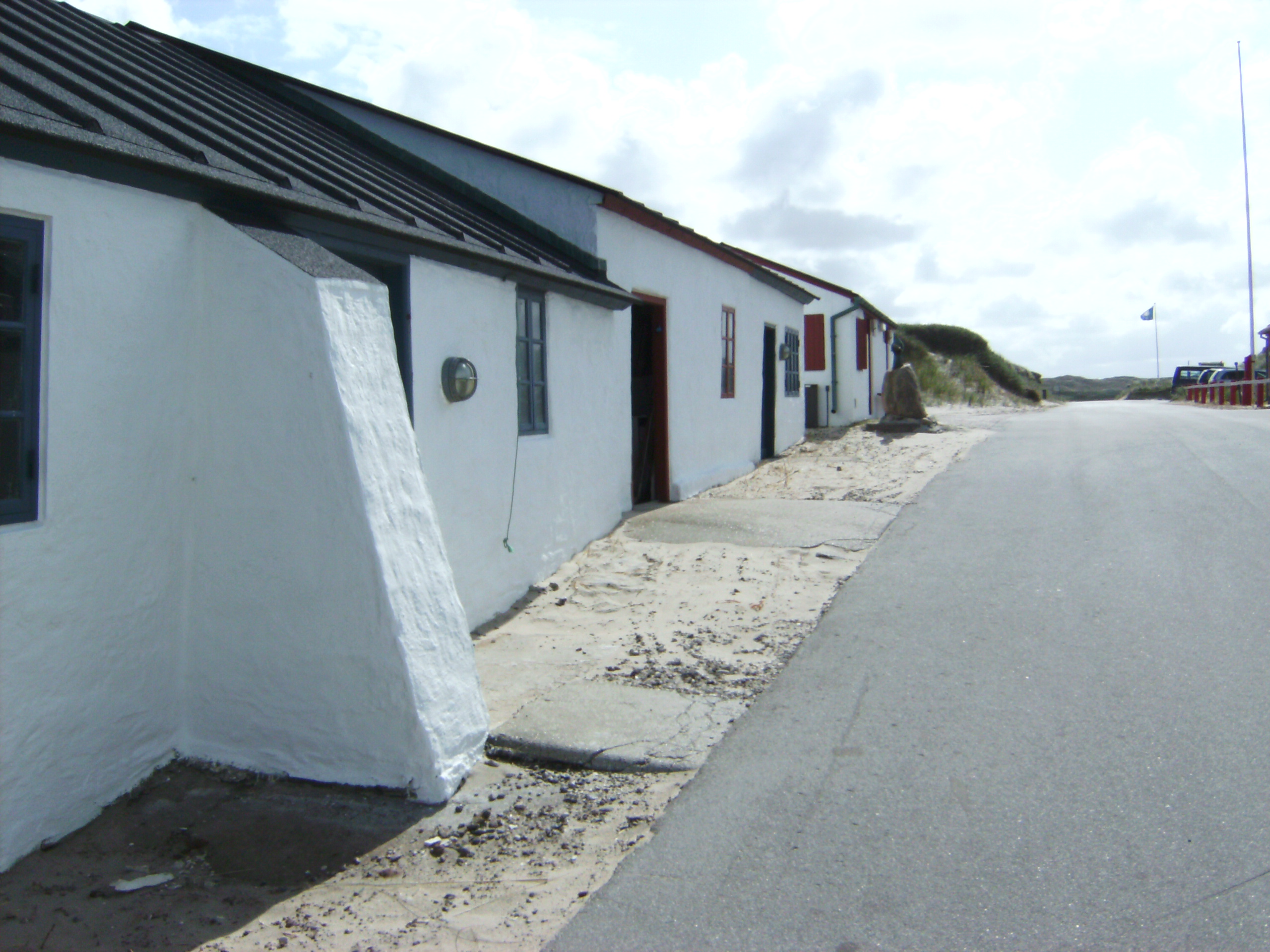 Stenbjerg Landingsplads er en ophalerplads for Veterhavskystfiskeri vest for Thisted Former fishingplace in Jylland, Denmark Vejen mod øst